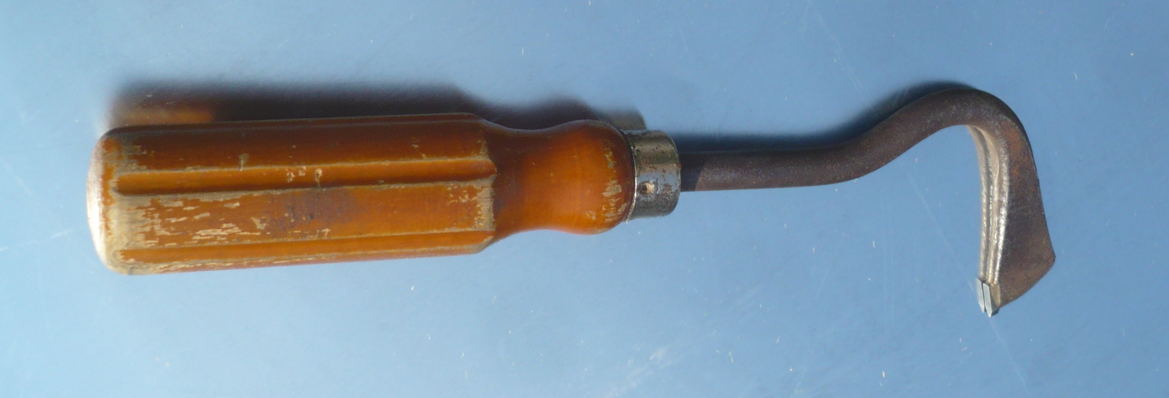 Une griffe, outil utilisé par les couvreurs pour couper le zinc.